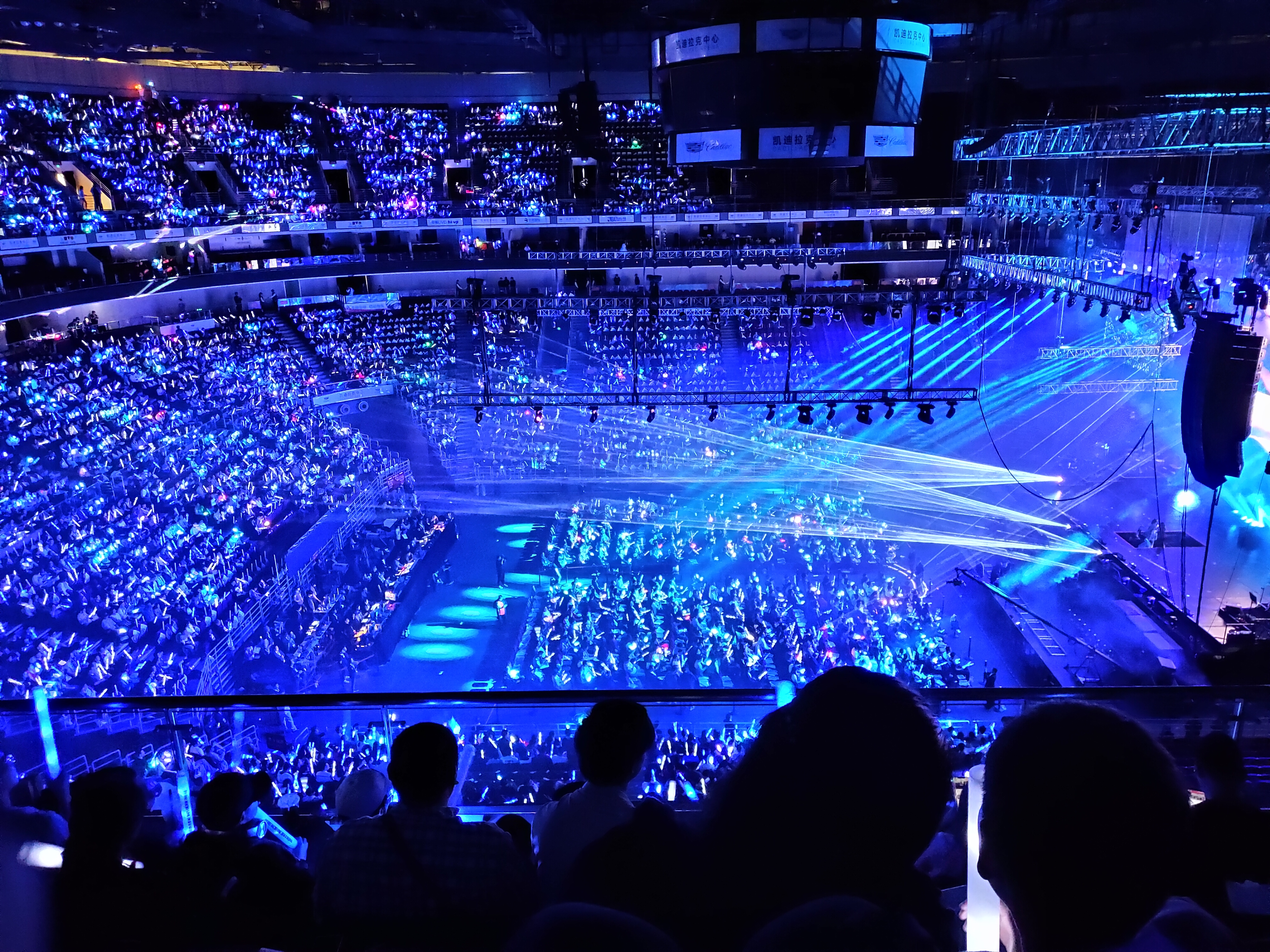 BML2018北京凯迪拉克中心C座